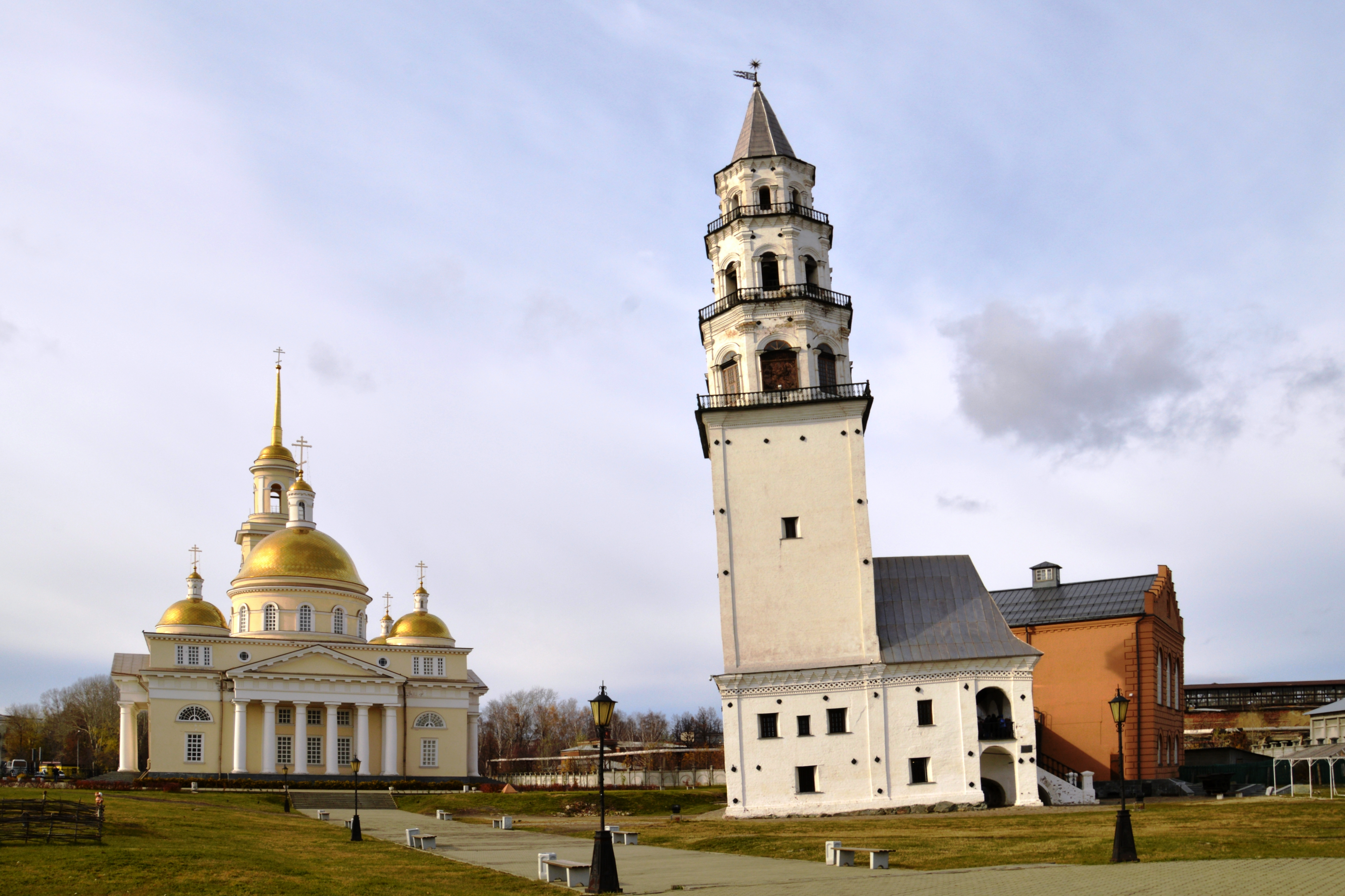 башня наклонная Демидовых: сквер Демидовых, 3, Невьянск, Невьянский район, Свердловская область